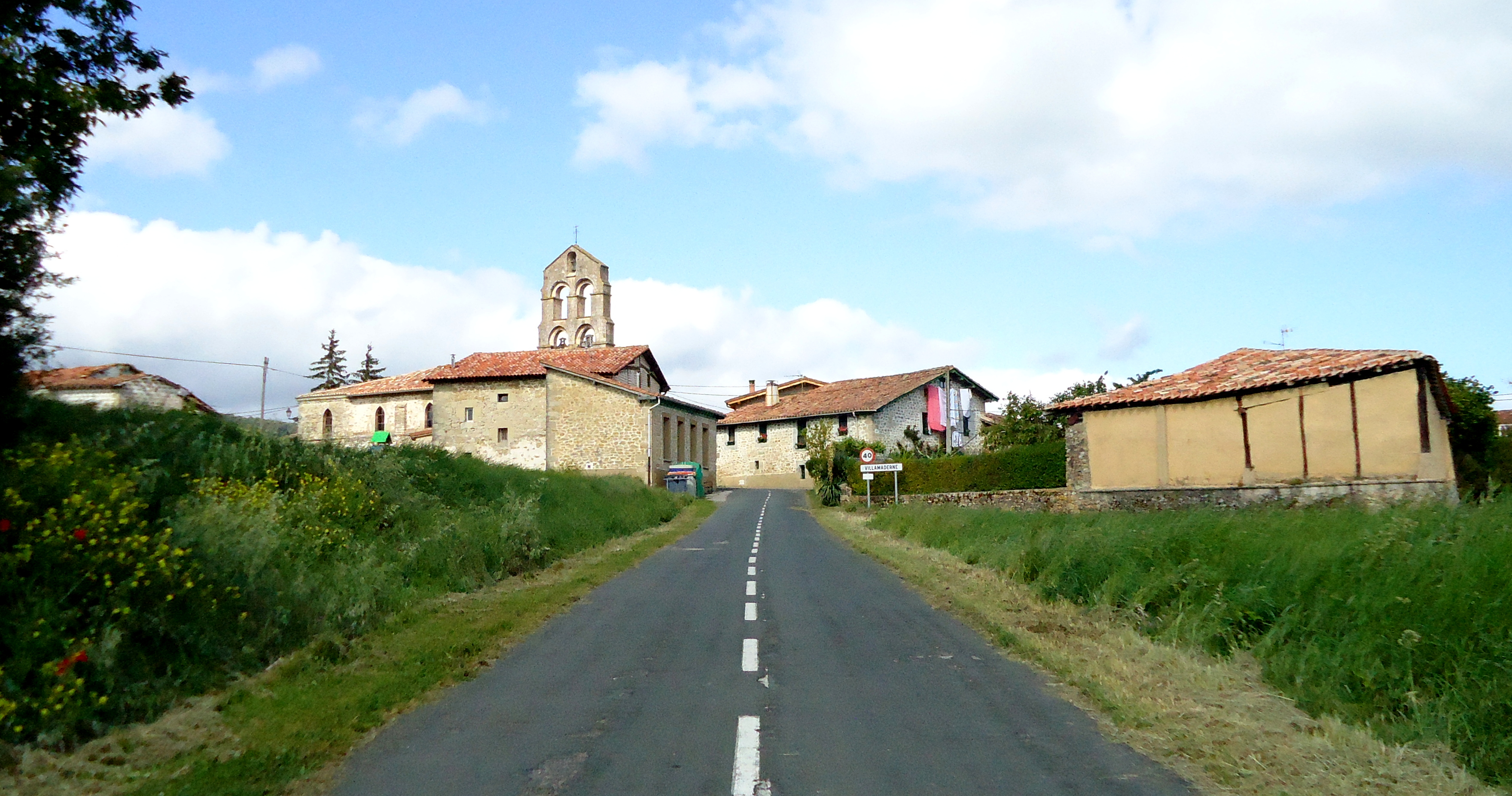 Villamaderne herria